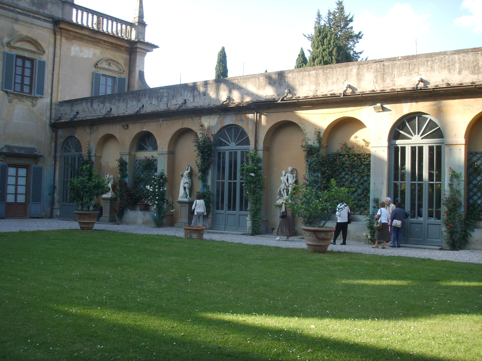 Villa guicciardini corsi salviati, limonaia